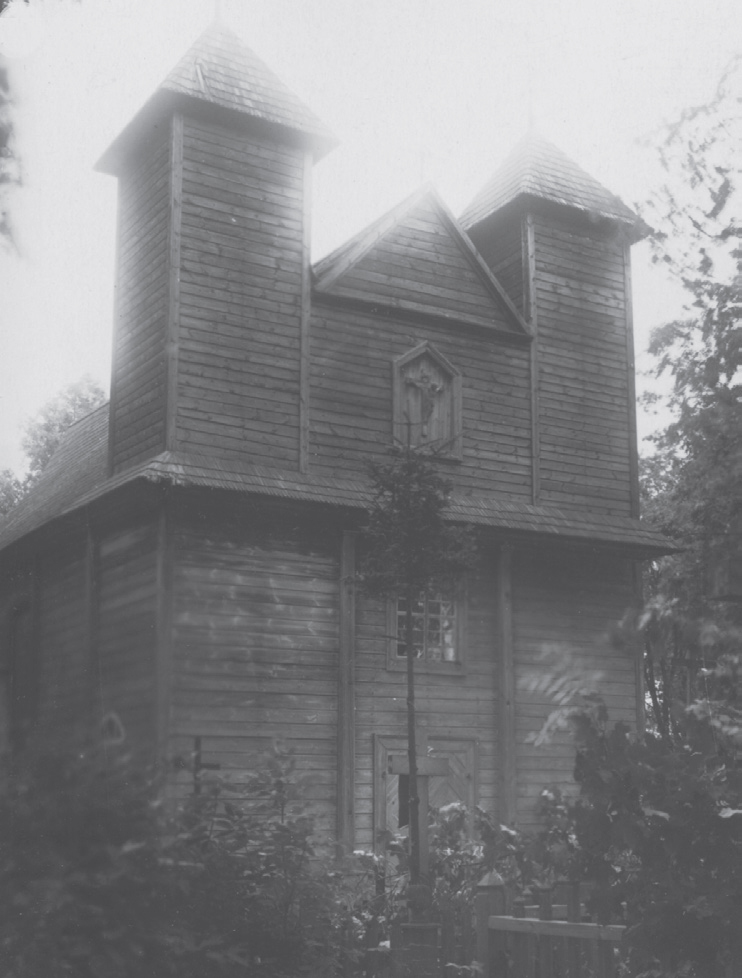 Беларуская (тарашкевіца): Кашубінцы (Kašubincy). Касьцёл